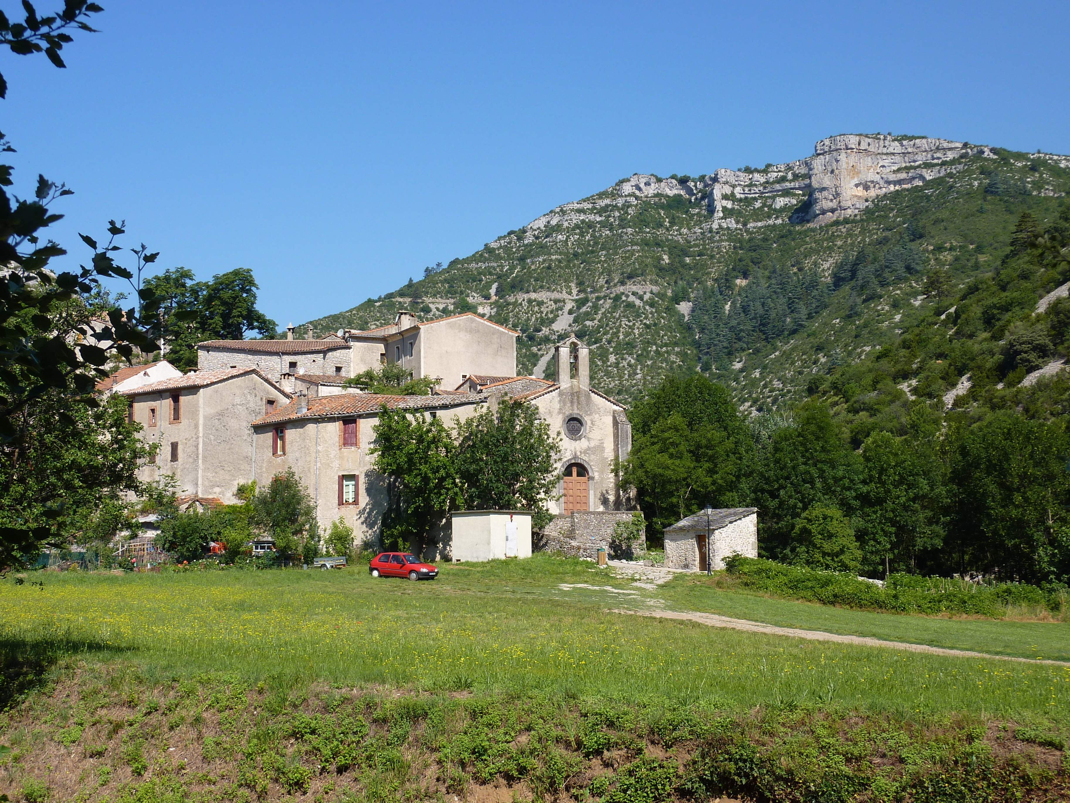 Le village de Navacelles: partie proche de l'église